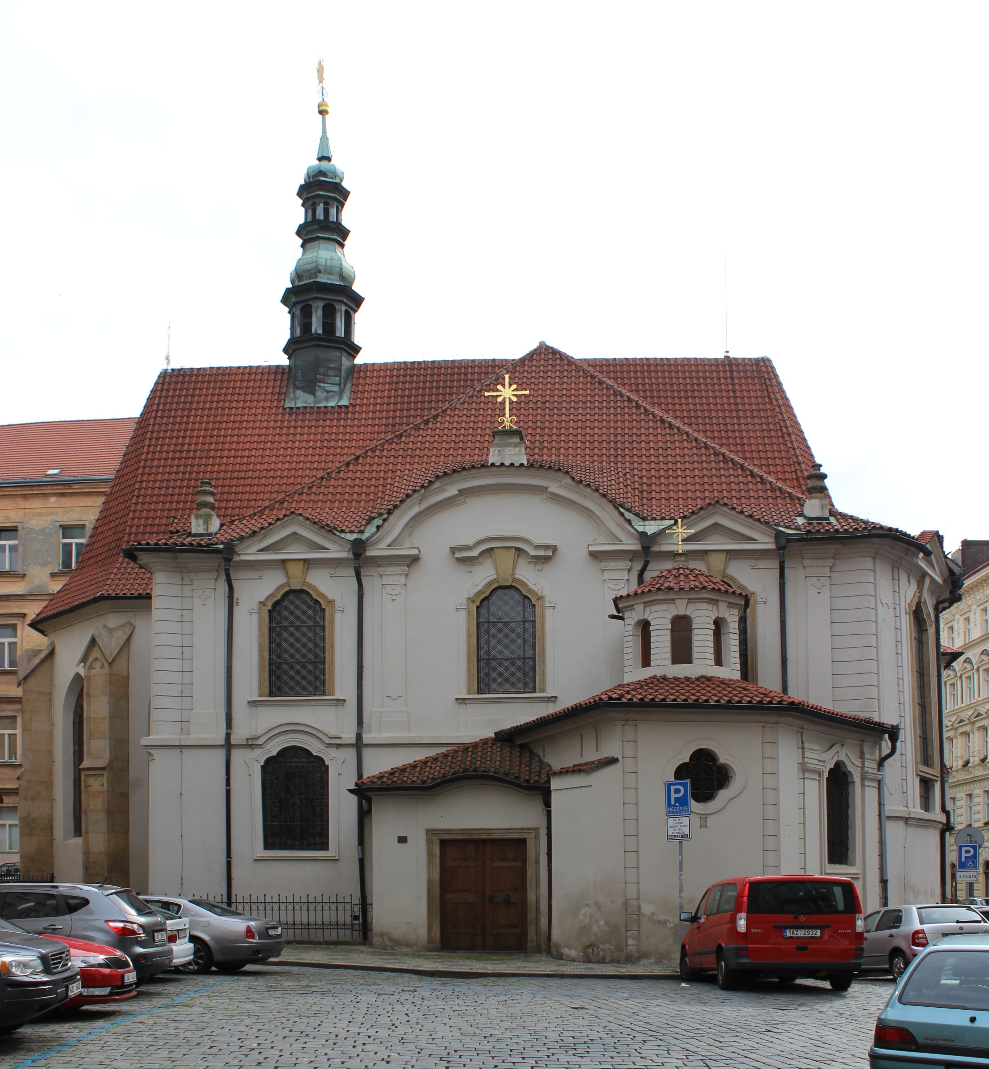 Pražský novoměstský kostel svatého Vojtěcha (pohled od severu).